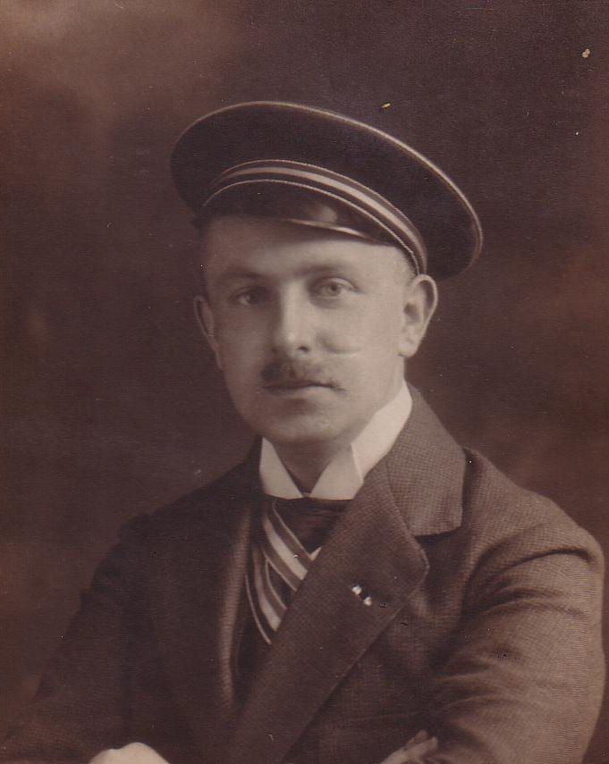 Porträtfotografie von Karl Hans Walther als Angehörigem des Corps Normannia Berlin